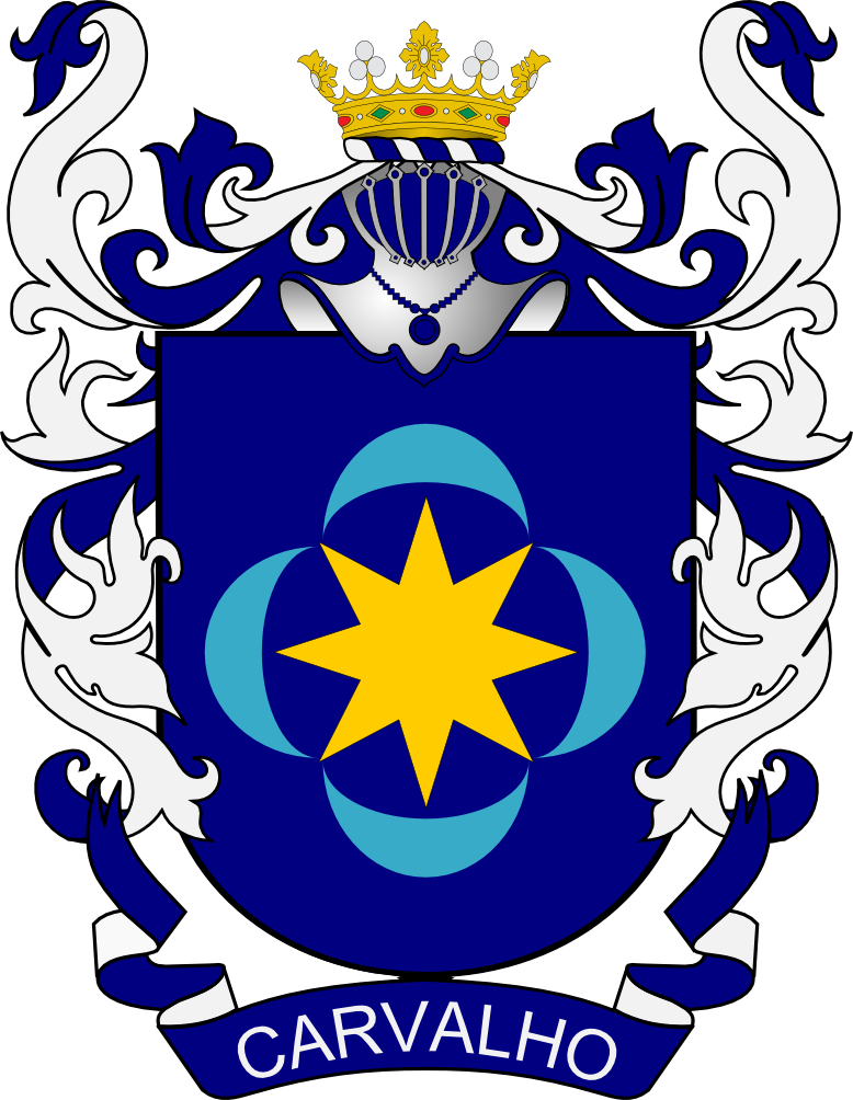 Brasão de Armas da Família Carvalho, coroada com a coroa do Marques de Pombal.